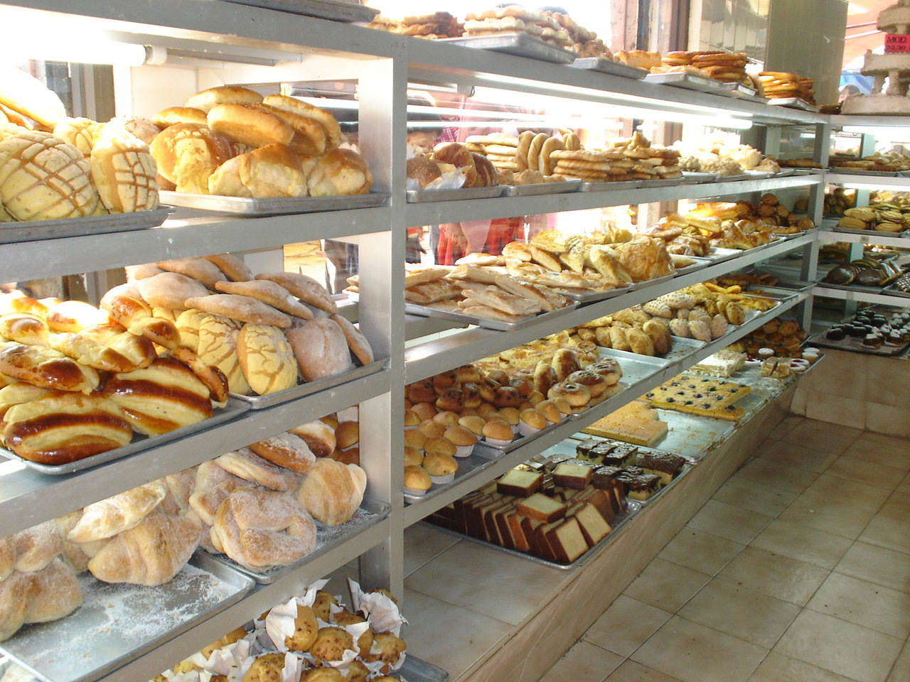 PANADERIA MEXICANA